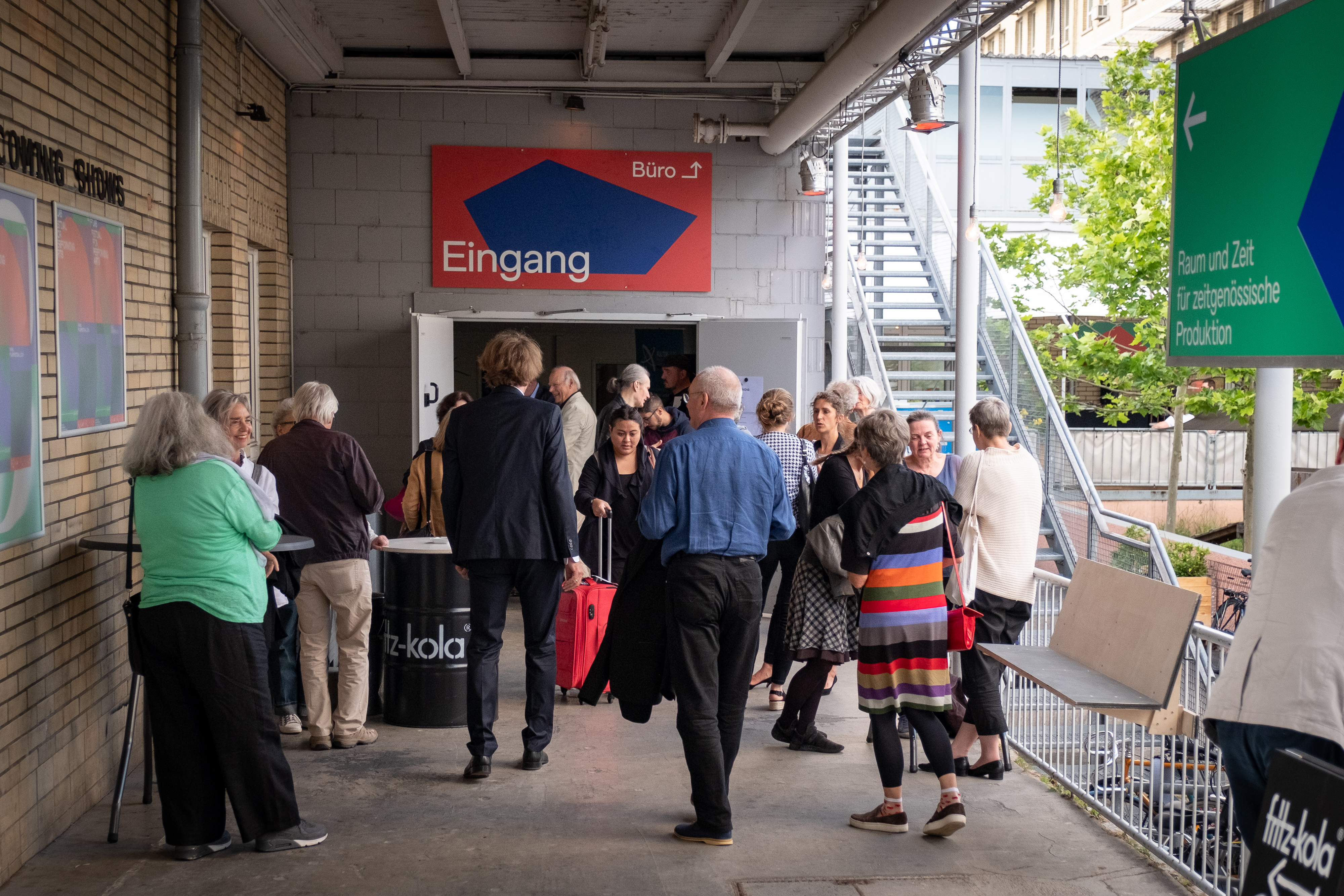 Eingang Frankfurt LAB © Christian Schuller